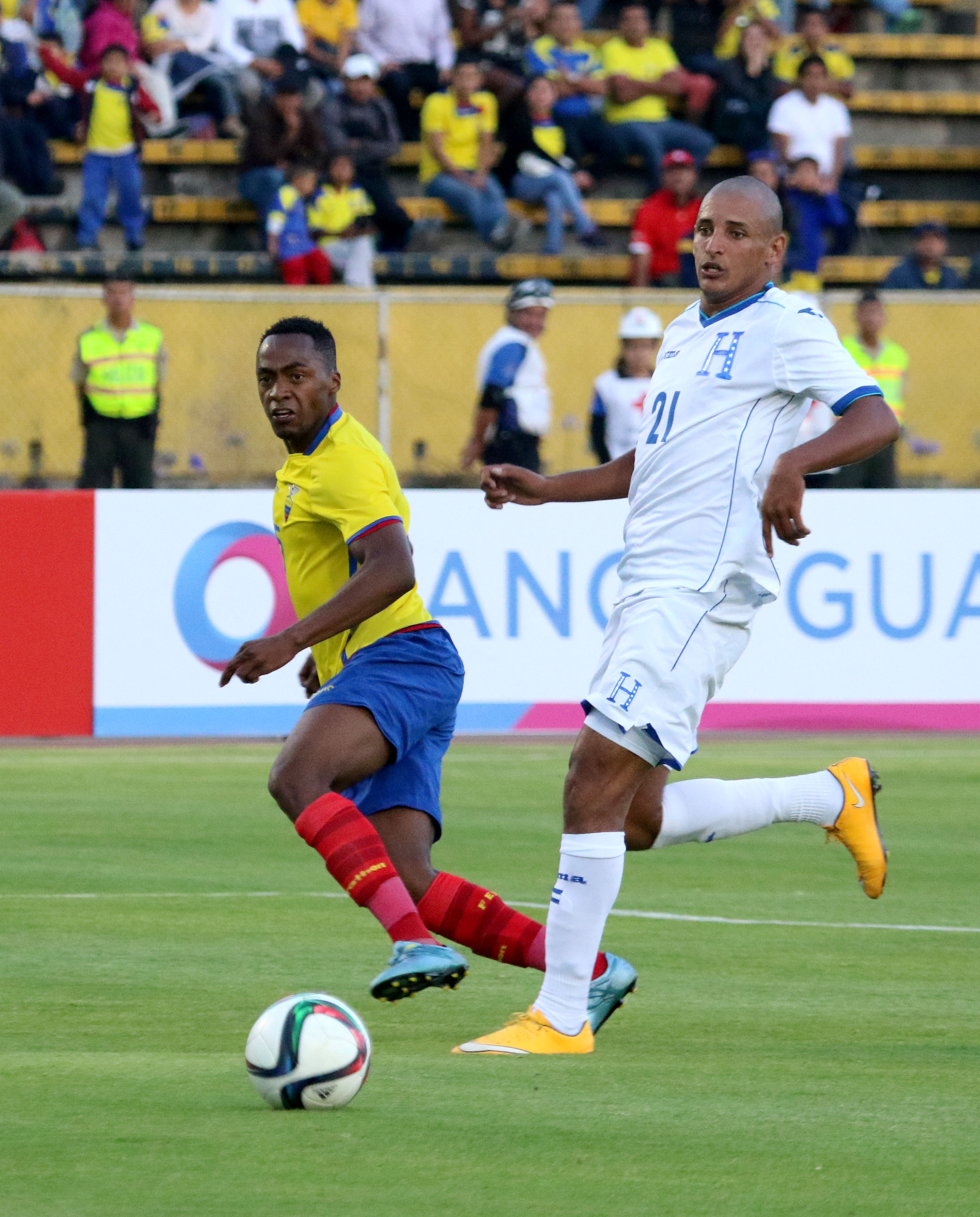 Quito, 08 de sept. (Andes).-Ecuador enfrenta a Honduras en partido amistoso jugado en el estadio Olimpico Atahualpa. En la gráfica Renato Ibarra (6) de Ecuador, remata el balón ante la marca de César Oseguera (21) de Honduras. Foto:César Muñoz/Andes